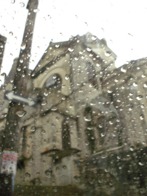 Fotografía de Cuetzalan (Puebla) en un día lluvioso